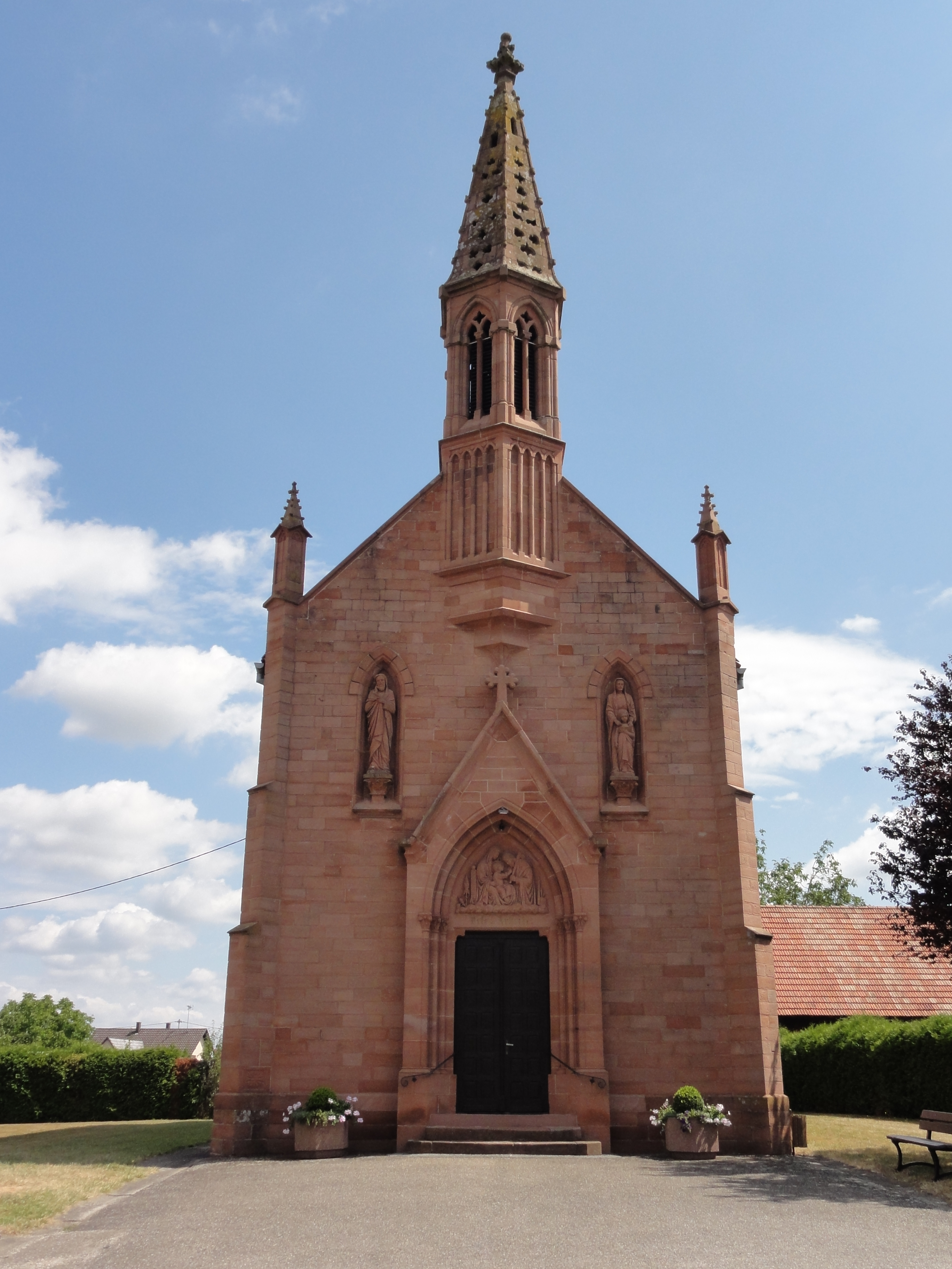 Alsace, Bas-Rhin, Hoffen, Leiterswiller, Église Saint-Joseph (IA00118873).